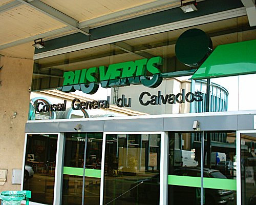 Gare routière de Caen en 2004.